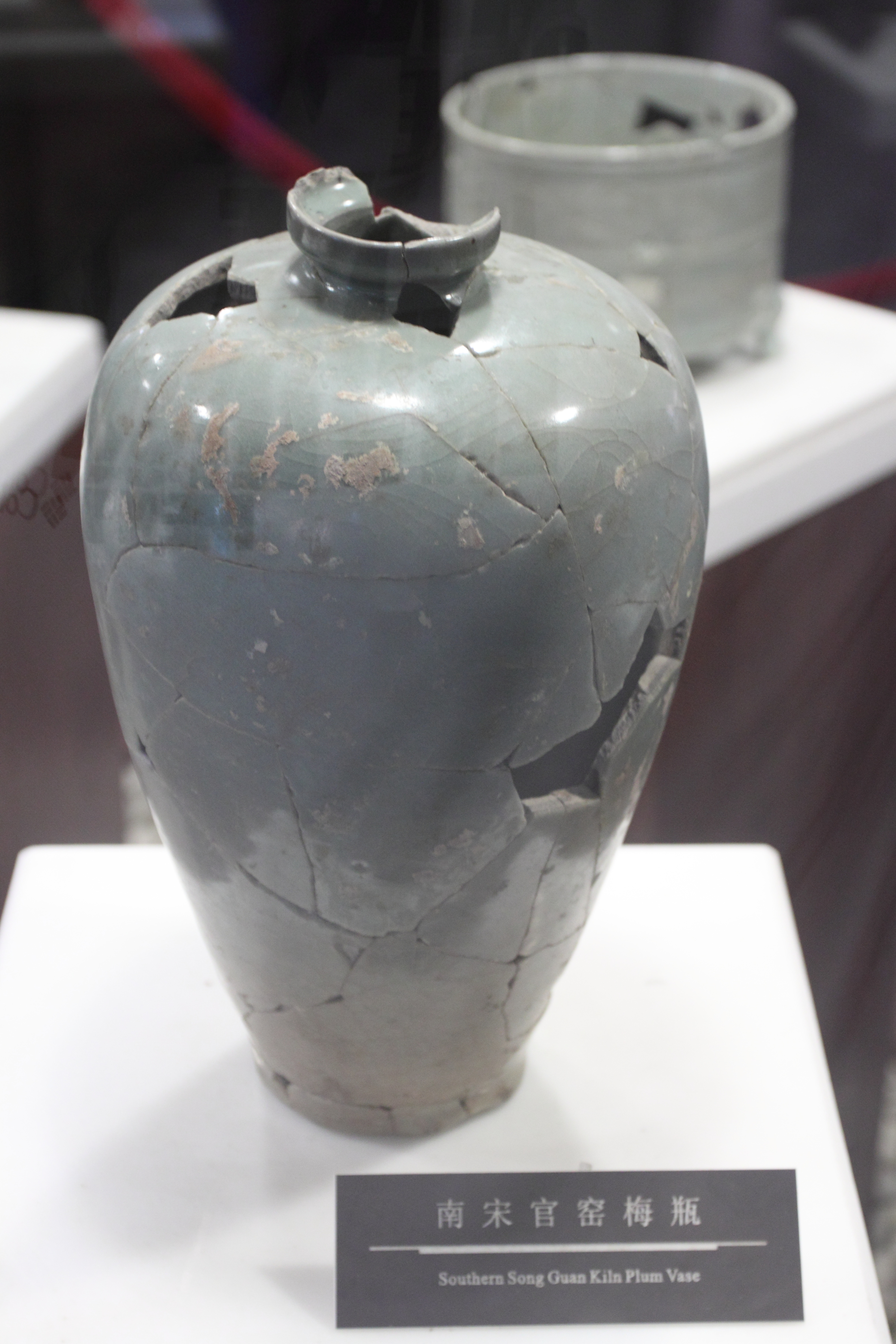 杭州南宋官窑博物馆藏品——南宋官窑梅瓶。